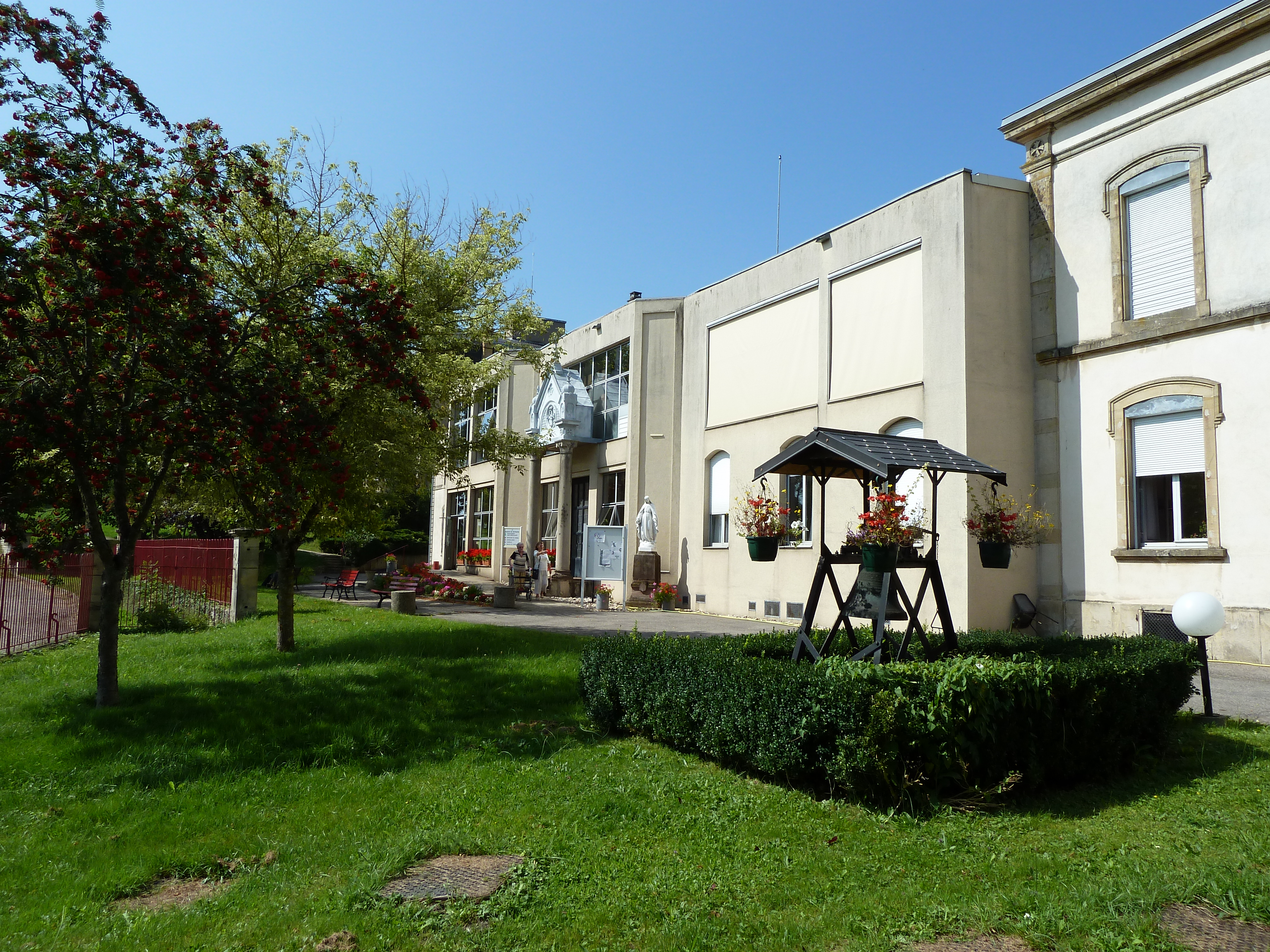 Cirey-sur-Vezouze cloche devant la maison de retraite sise dans un ancien couvent des Soeurs de la Charité de Strasbourg.